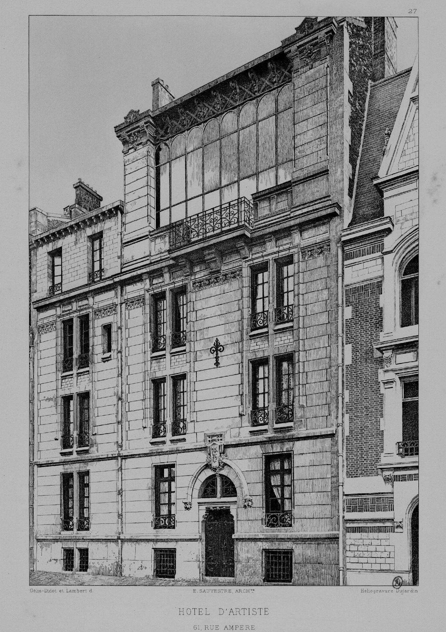 Hôtel d'artiste au 61 rue Ampère, Paris 17ème arrondissement Architecte: S Sauvestre (vers 1880) Dessin de la façade